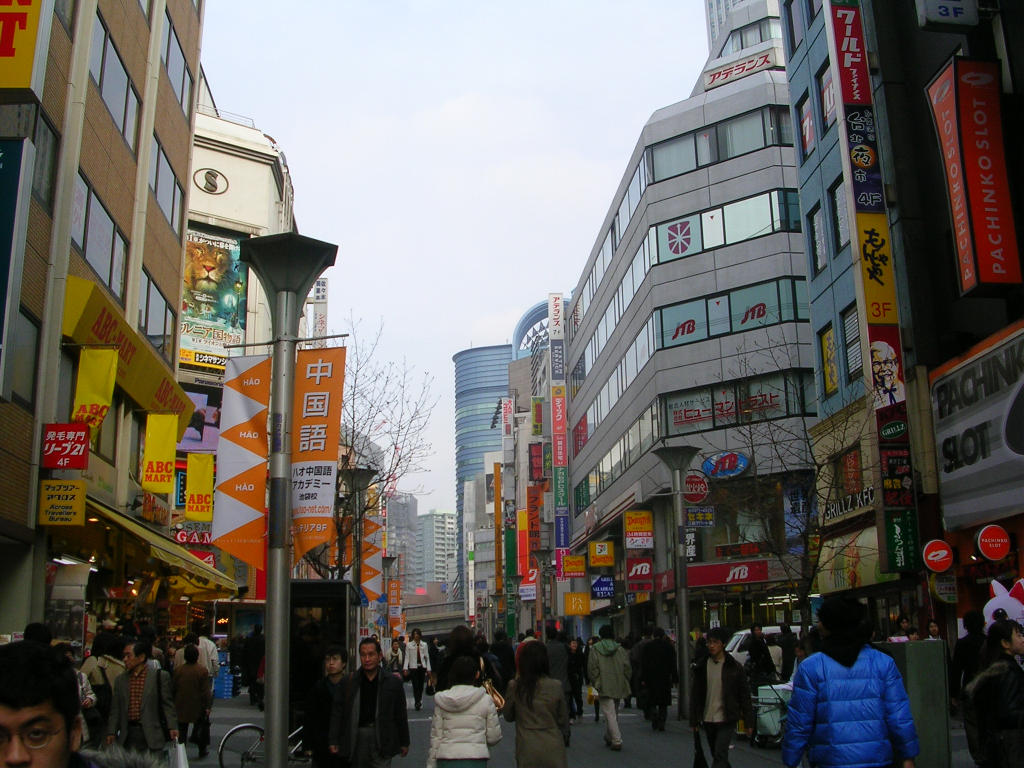 Ikebukuro, Toshima-ku, Tokyo